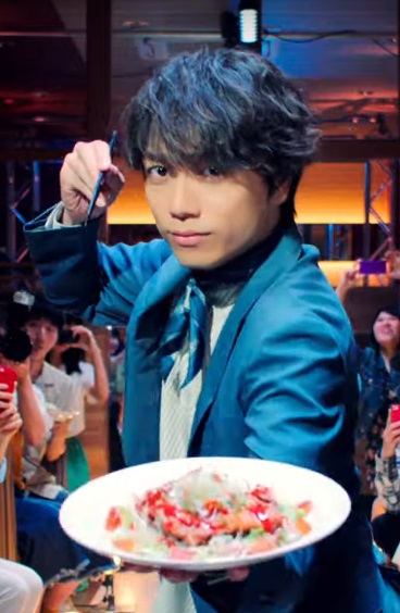 ガストのCM（夏コレ）に出演する山崎育三郎